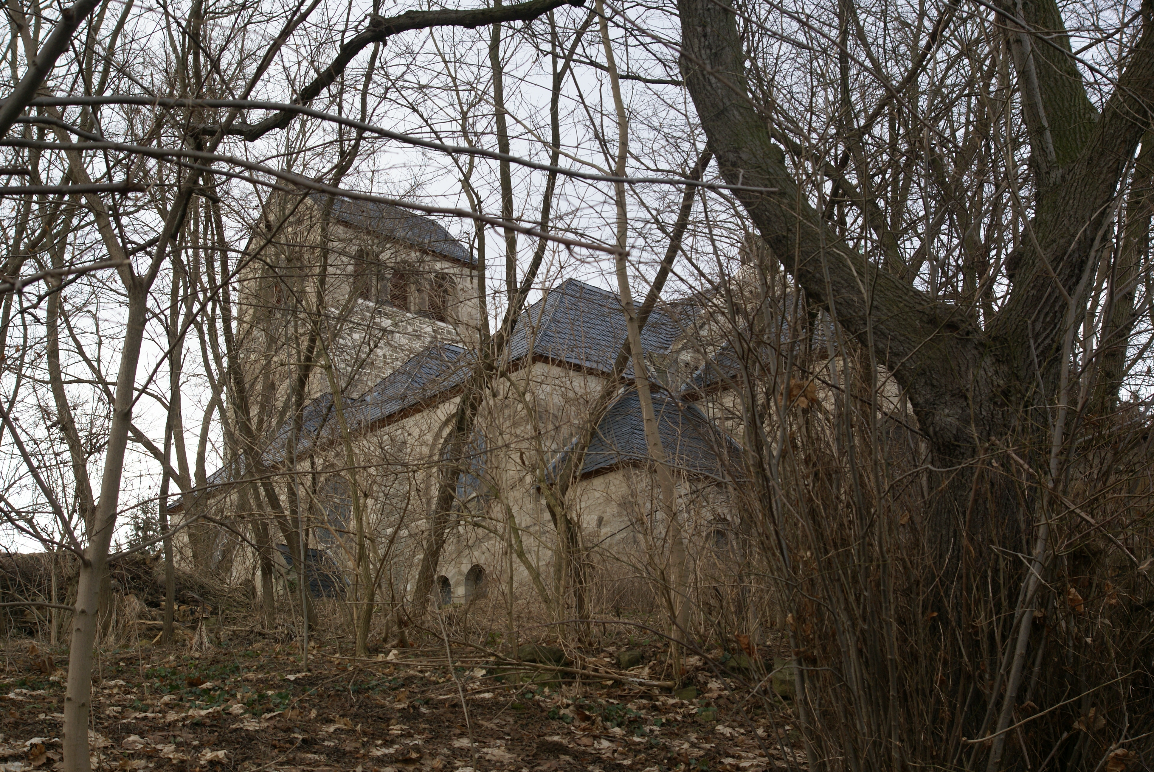 Blick auf die Dorfkirche Müllerdorf